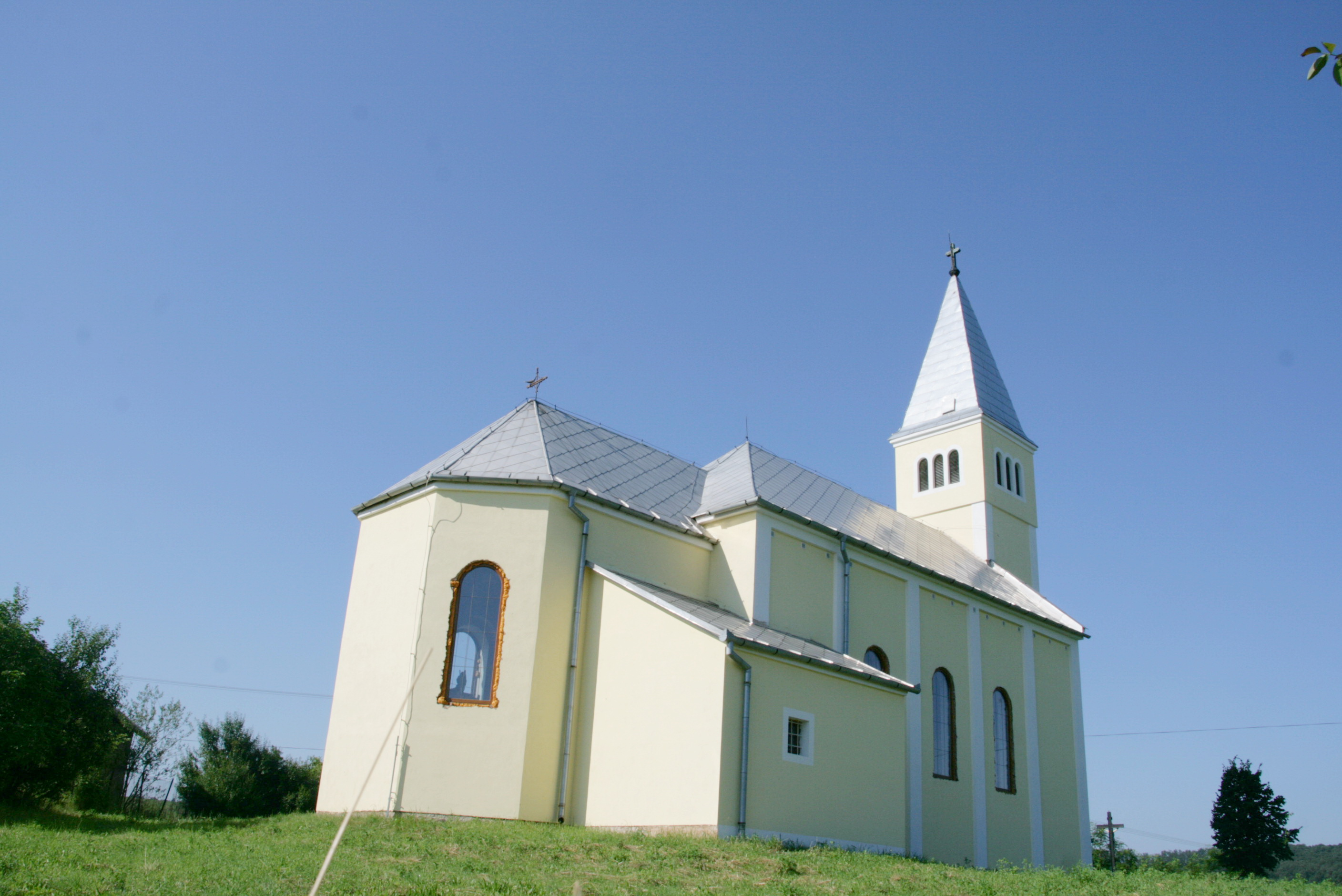 Gömörfüge - katolikus templom